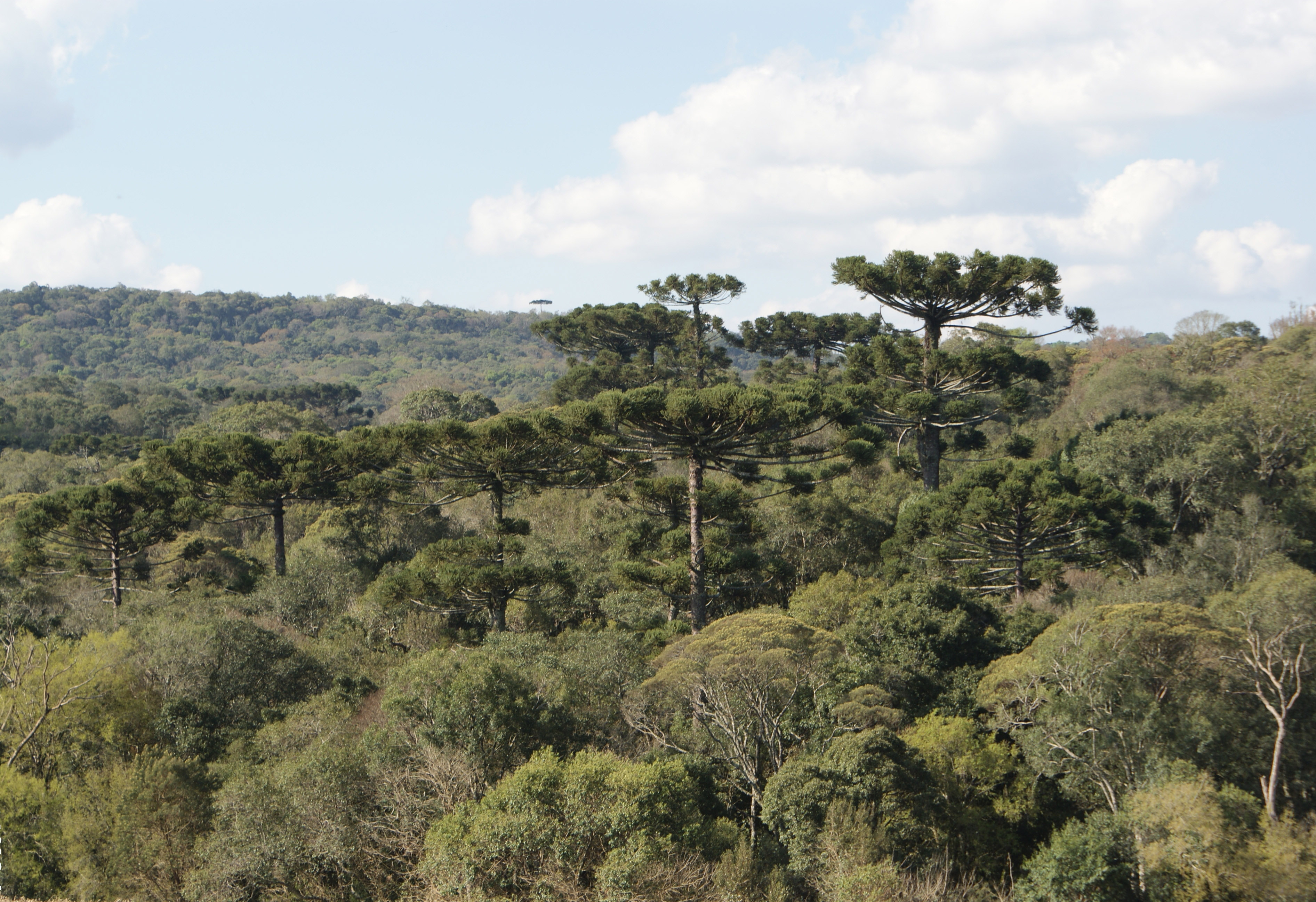 Vista da ESEC Mata Preta.